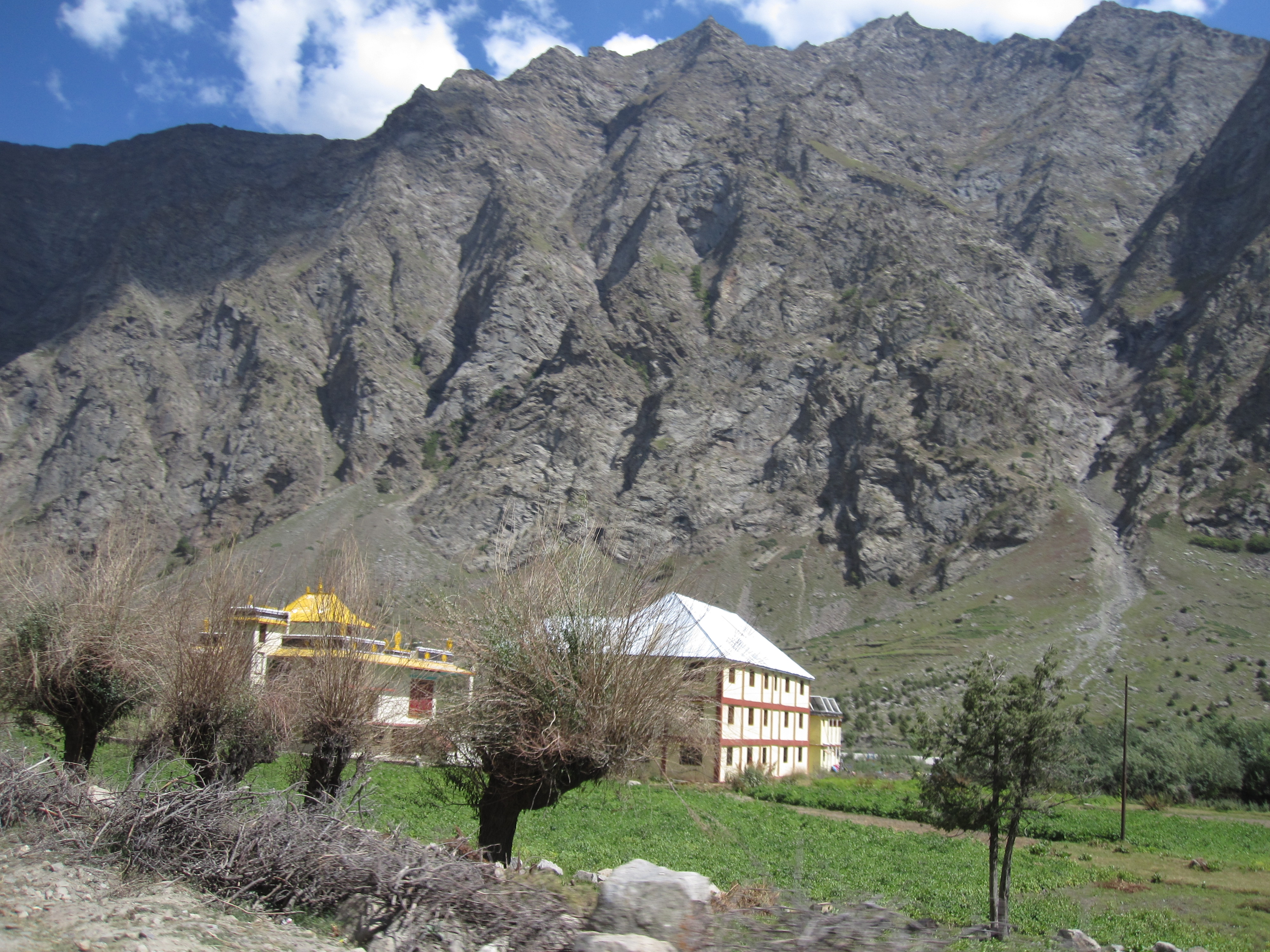 Jispa, Lahaul, Himachal Pradesh, India